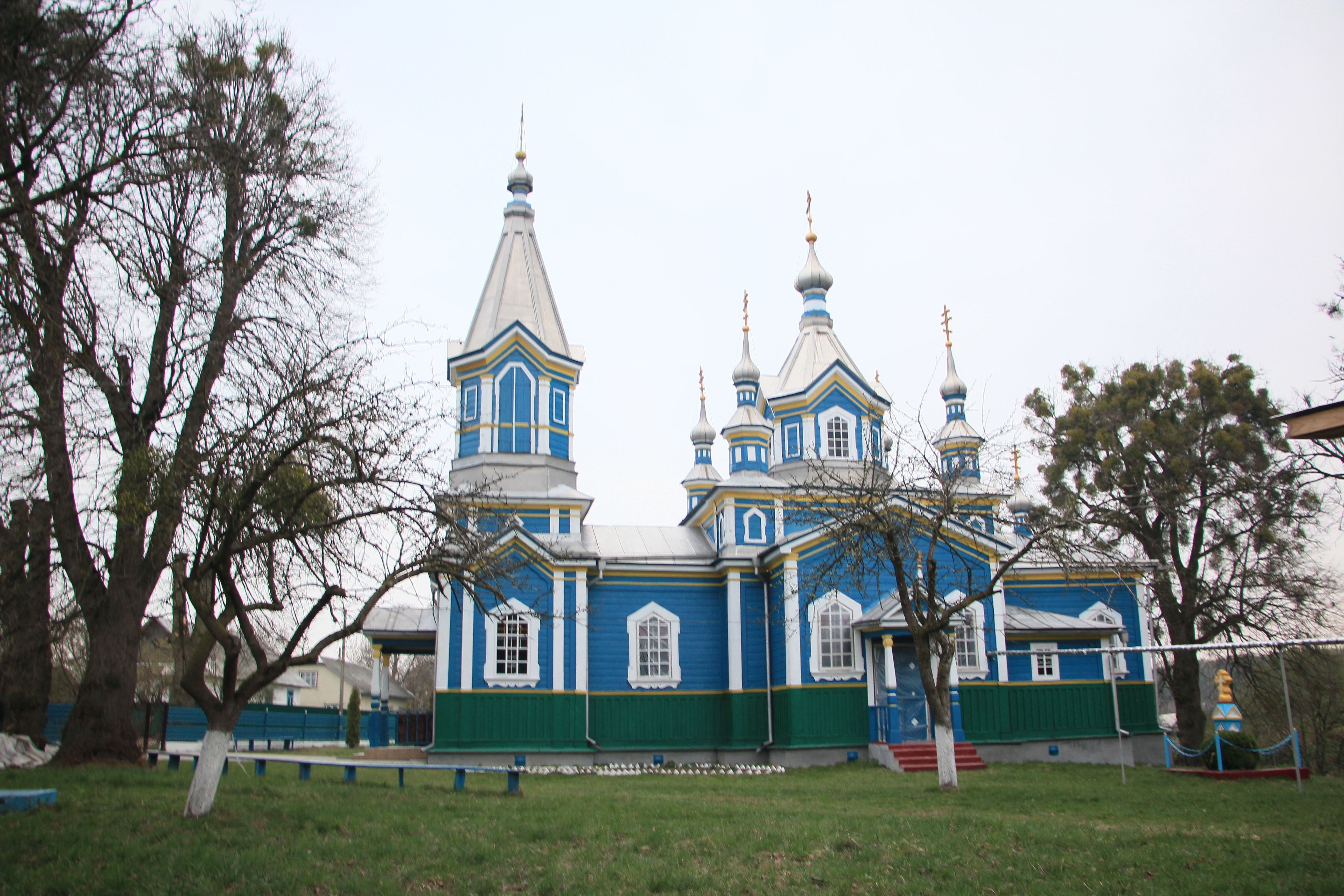 Вигляд з пагорба на село Будки Кременецького району, Тернопільської області